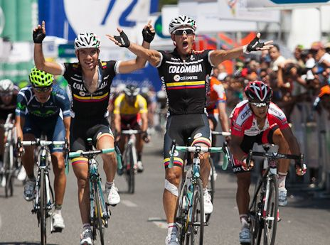 Llegada de la 5ª etapa. Juan Pablo Forero ganador